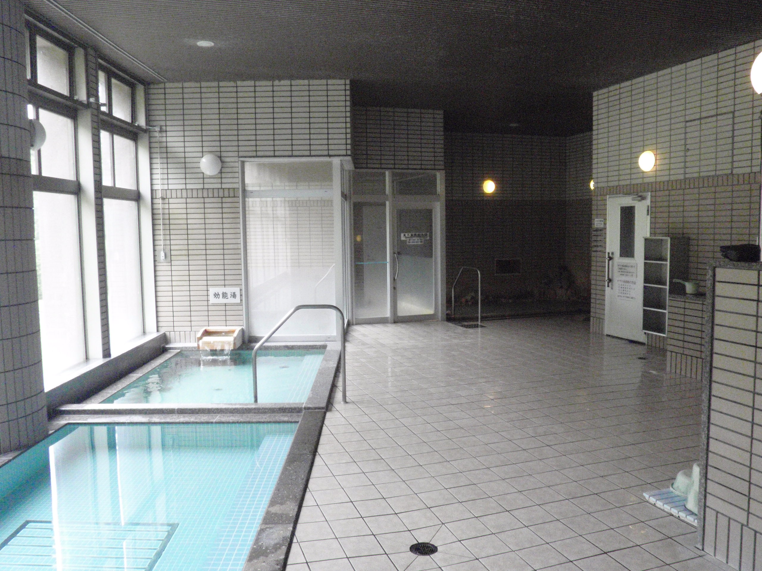 五味温泉の浴室。左手前の浴槽は水道水の沸かし湯。右奥が温泉浴槽。